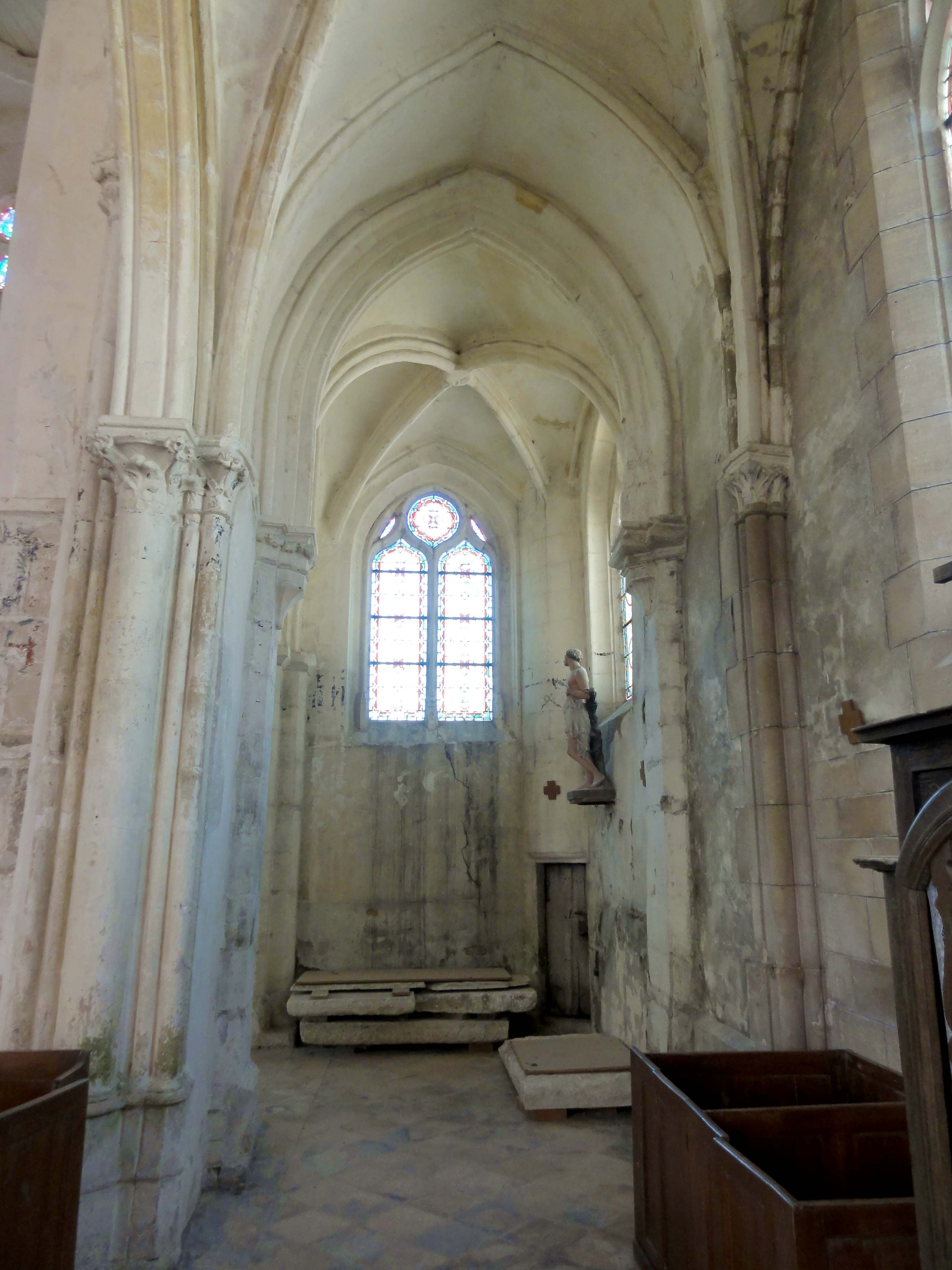 Intérieur de l'église (voir titre).